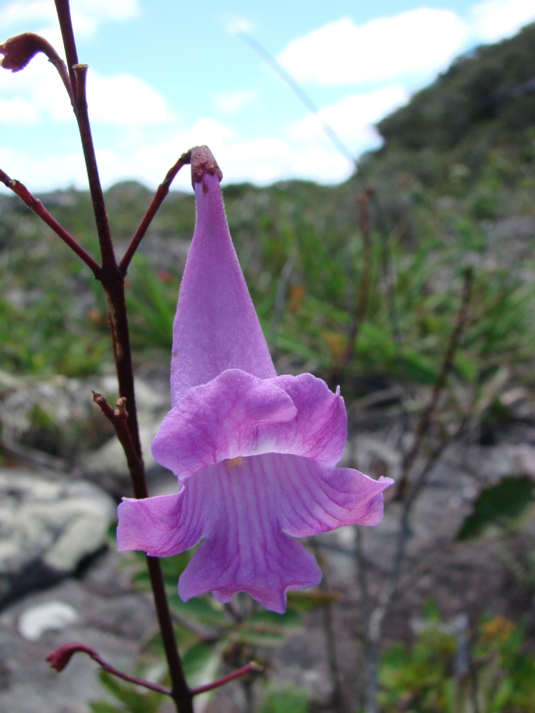 Jacaranda grandifoliolata A.H. Gentry - BIGNONIACEAE - Parque Natural Municipal Morro do Pai Inácio - Chapada Diamantina - Palmeiras - Bahia - Brasil.